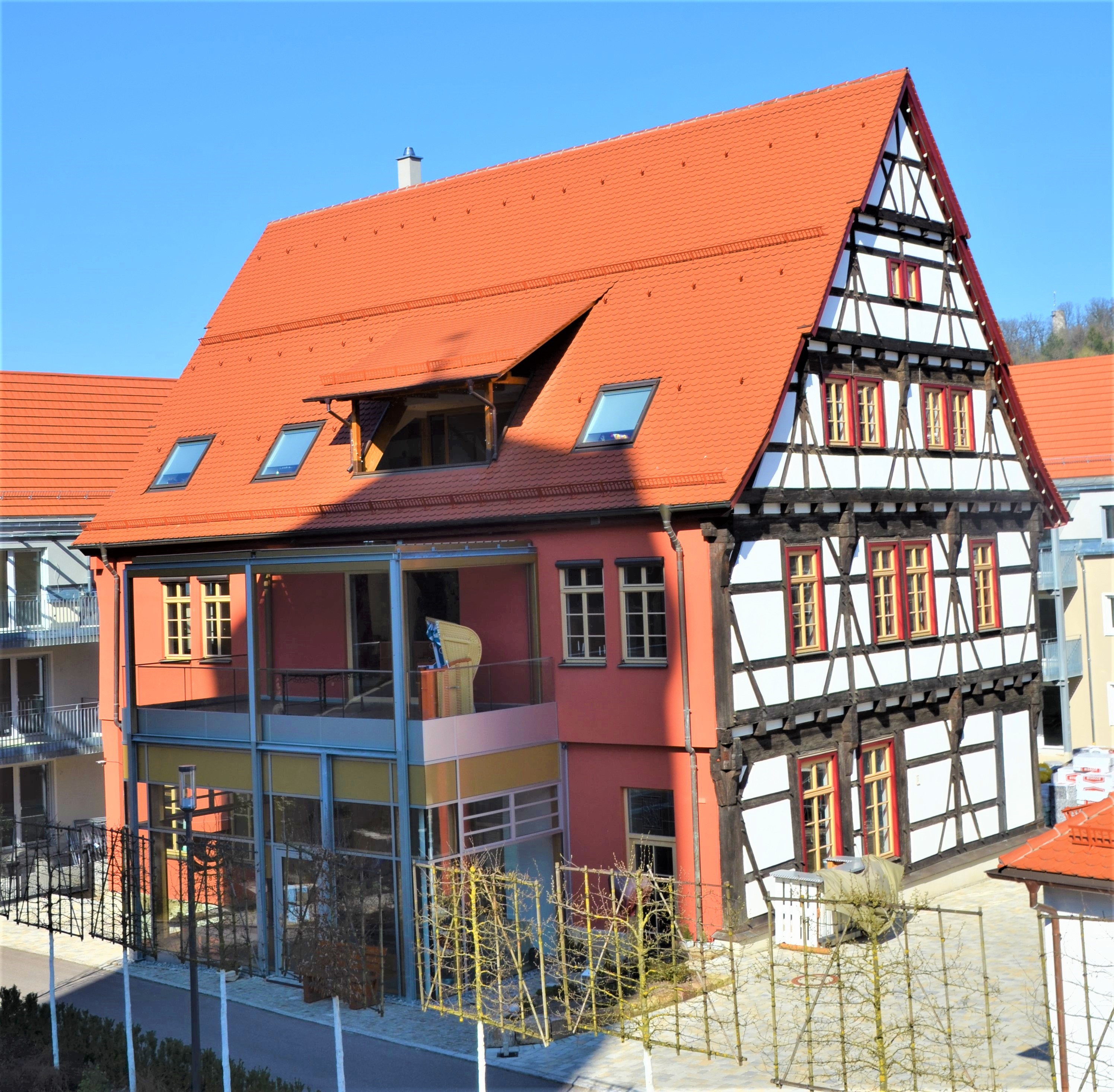 Rechbergsche Scheuer in Schwäbisch Gmünd von Südost